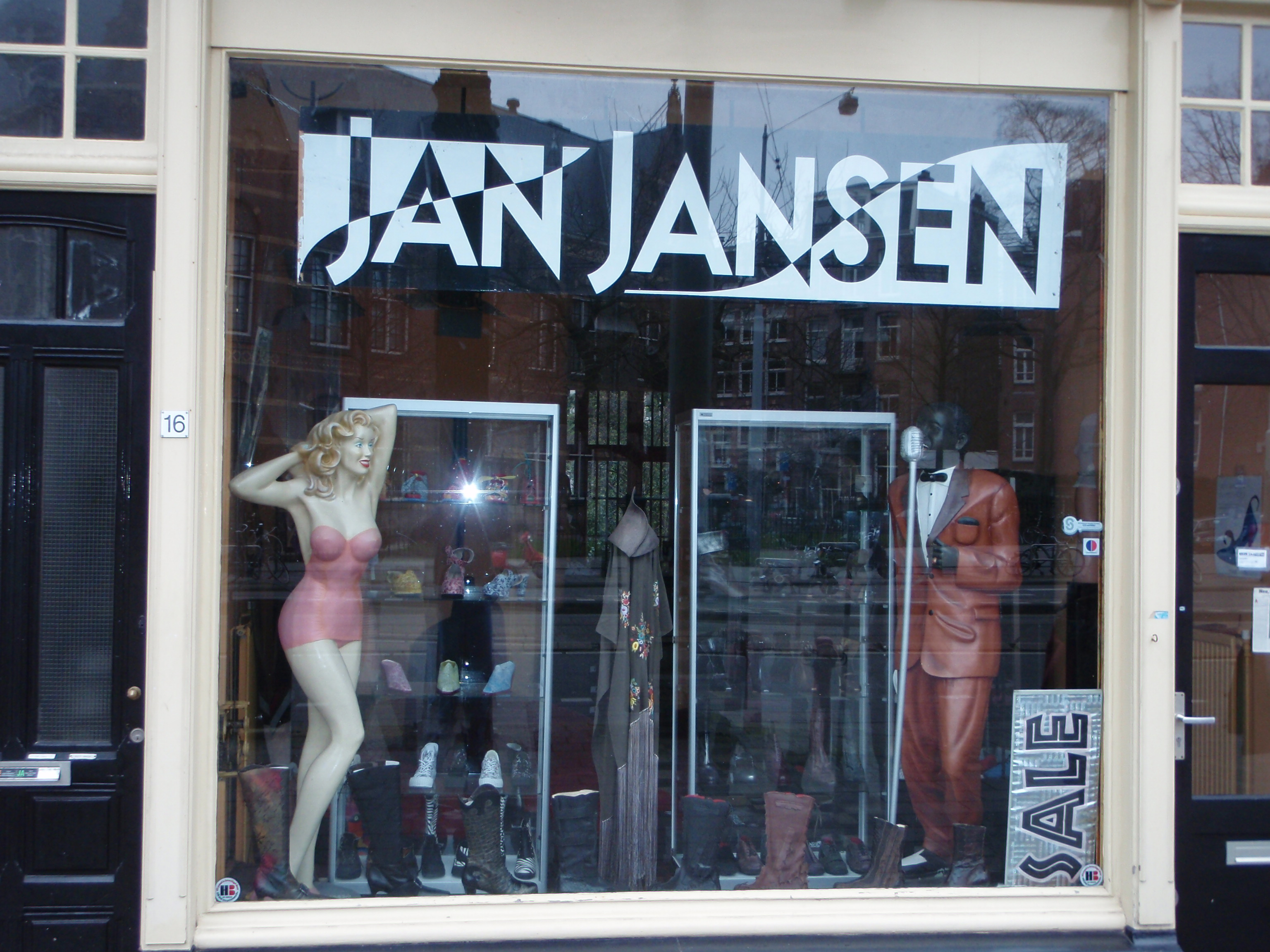 Jan Jansen (schoenontwerper), Amsterdam